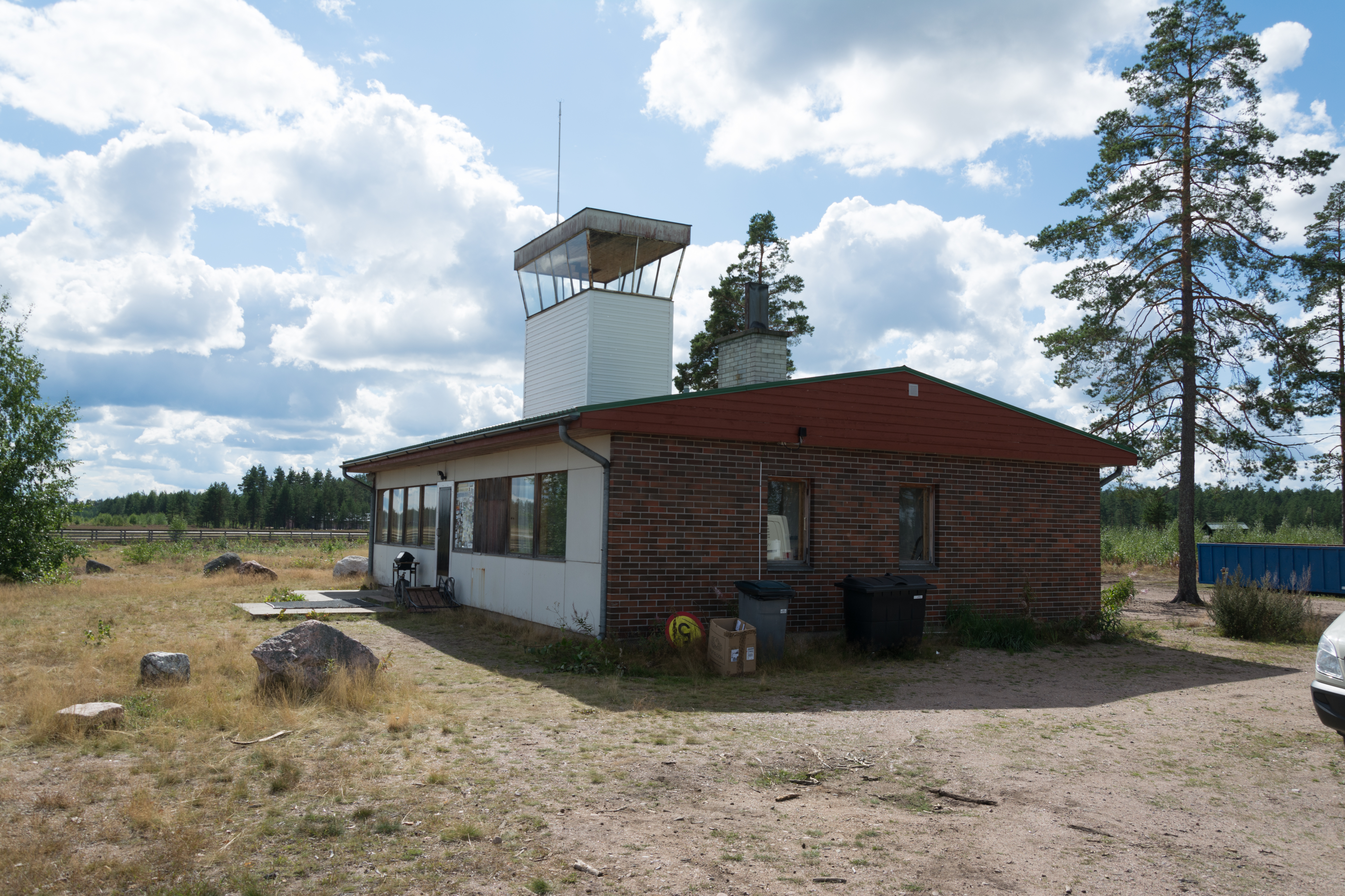 Rakennus Kiikalan lentokentällä Salossa